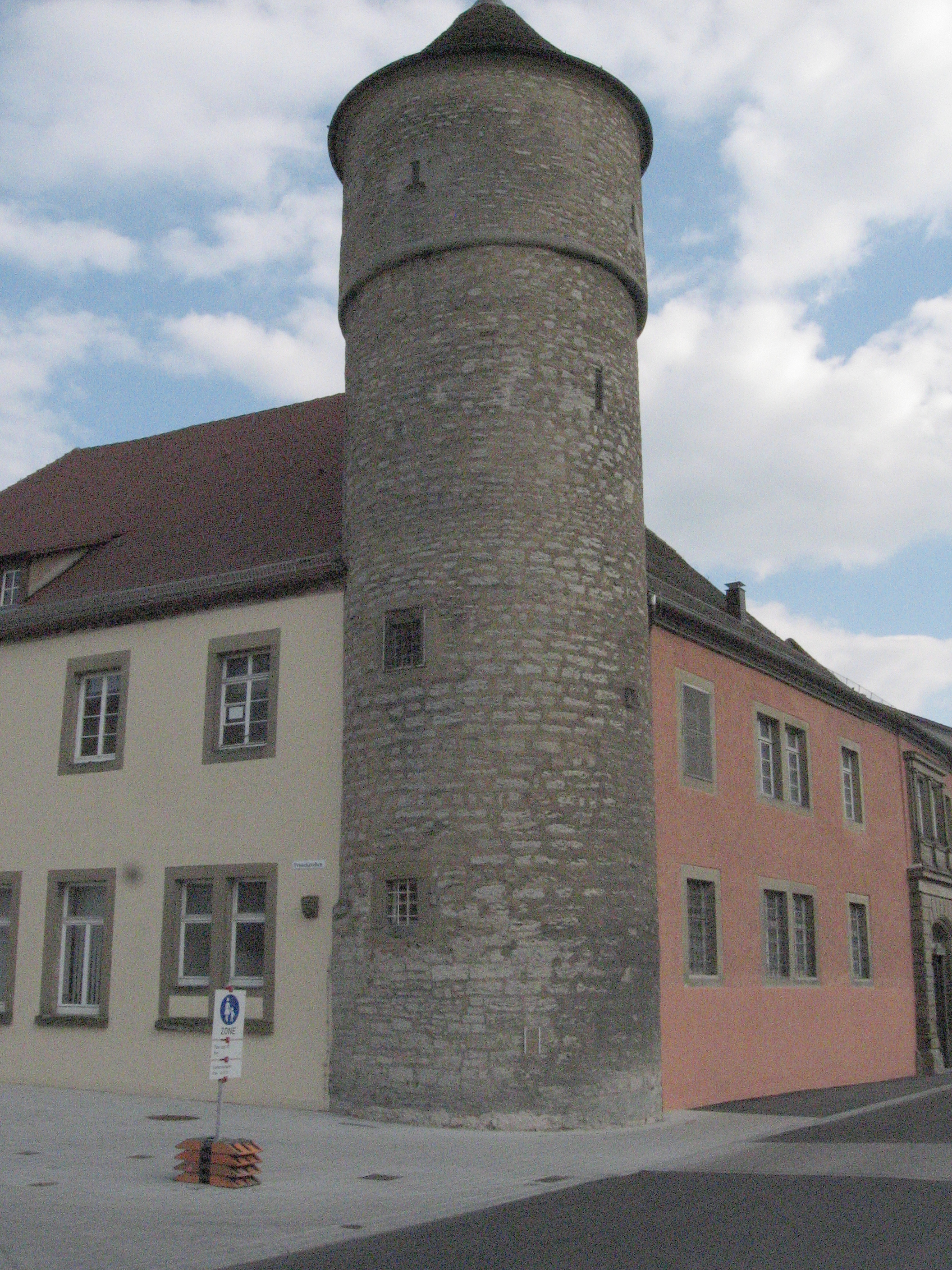 Blick nach SE über die Salinenstraße auf den Diebsturm der Haller Stadtbefestigung, Salinenstraße 2. Der Turm stand an der Nordwestecke der ersten Stadterweiterung der Kernstadt (vor dem Bau der Vorstädte). Neben dem Dorfmühlenturm der einzige Rundturm der Stadtbefestigung. Im Untergeschoss ein fensterloses Verlies, nur durch ein Angstloch zugänglich. Angaben nach dem Historiker Eduard Krüger („Die Stadtbefestigung von Schwäbisch Hall“, Verlag Hans P. Eppinger, Schwäbisch Hall, 1966). Am Bauwerk selbst befindet sich eine Informationstafel mit folgendem Text: „Rund ist selten Einer von ehemals zwei Rundtürmen der alten Stadtmauer ist der gut erhaltene Diebsturm. Er markiert die Stelle der esten Befestigung, an der sie vom Kocherufer hoch zum Säumarkt abknickt. Der Turm gehört mit seinen großen Quadern im unteren, 14 Meter hohen Teil noch zur alten staufischen Mauer, die wohl zwischen 1200 und 1250 um die Stadt rechts des Kochers gezogen wurde. Im unteren Raum befand sich das Haller Lochgefängnis – nur von oben her zugänglich.“